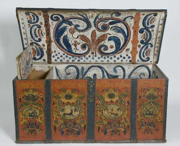 Kiste av furu med jernbeslag, fra Hol i Hallingdal. Innskrigt: Malet den 25de Mai 1844, for Mikkel Olsen Mehuus fød 1822. Foto: Anne-Lise Reinsfelt, Norsk Folkemuseum, bredde 134 cm., NF.19111-0329.